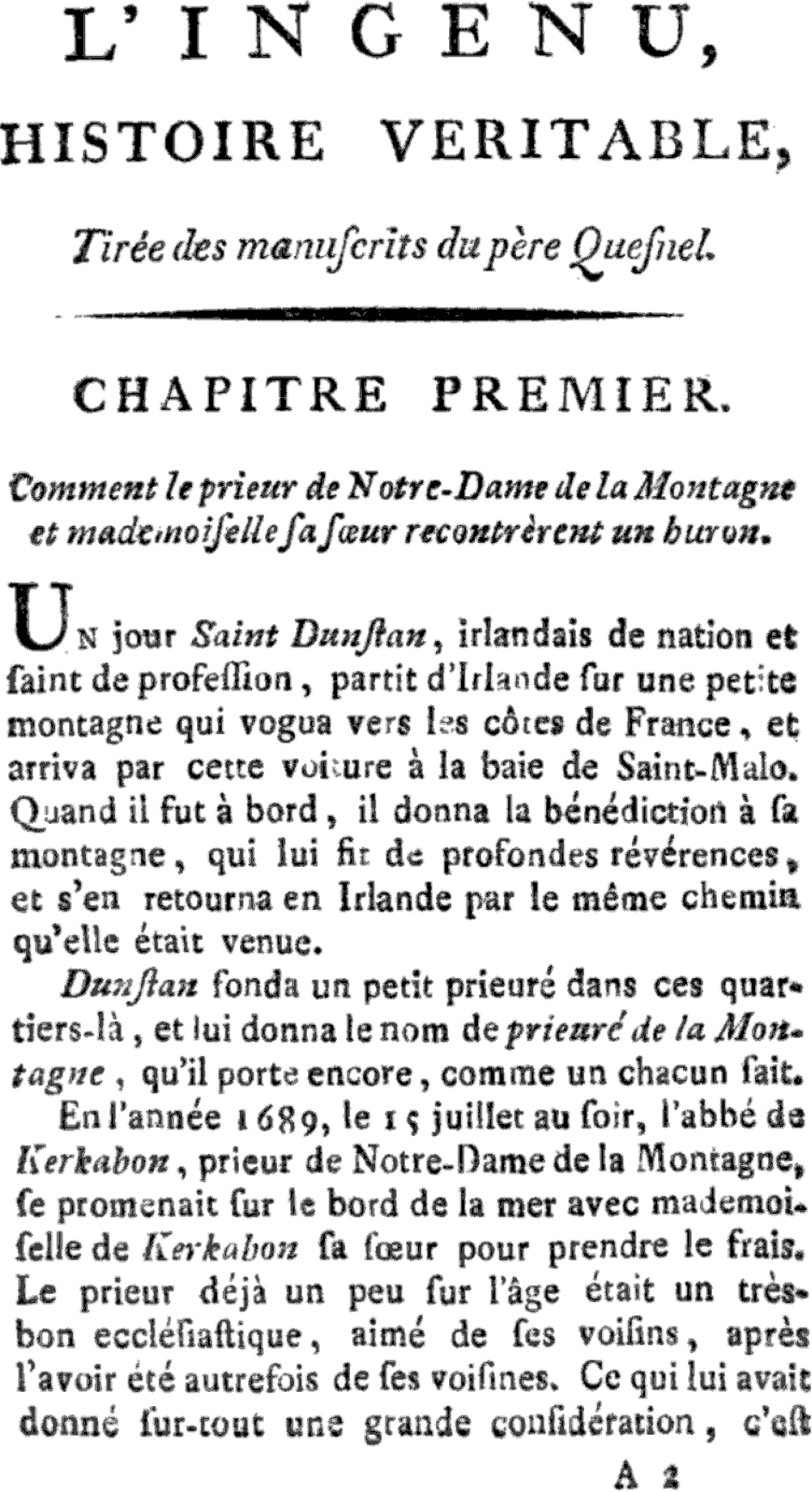 L'Ingénu by Voltaire (1694-1778)